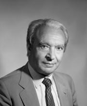 Sen. Prof. Decio Scardaccione